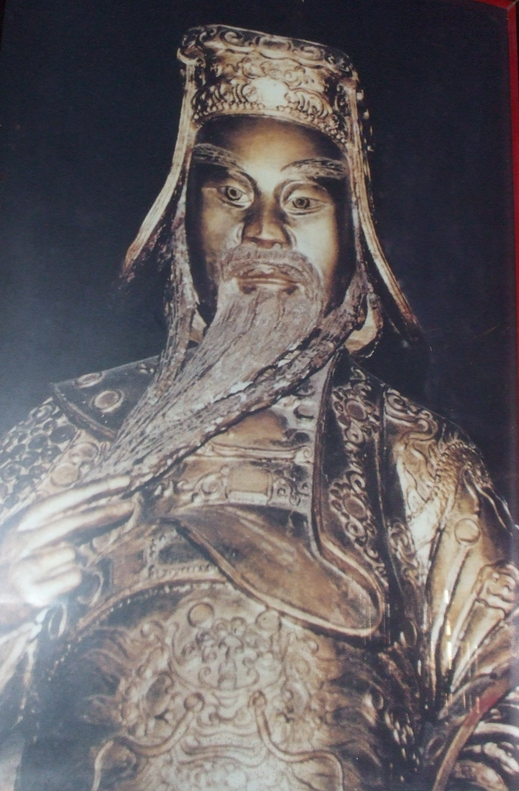 Chân dung Nguyễn Hữu Cảnh tại dinh Nguyễn Hữu Cảnh, thuộc xã Kiến An, Chợ Mới, An Giang .